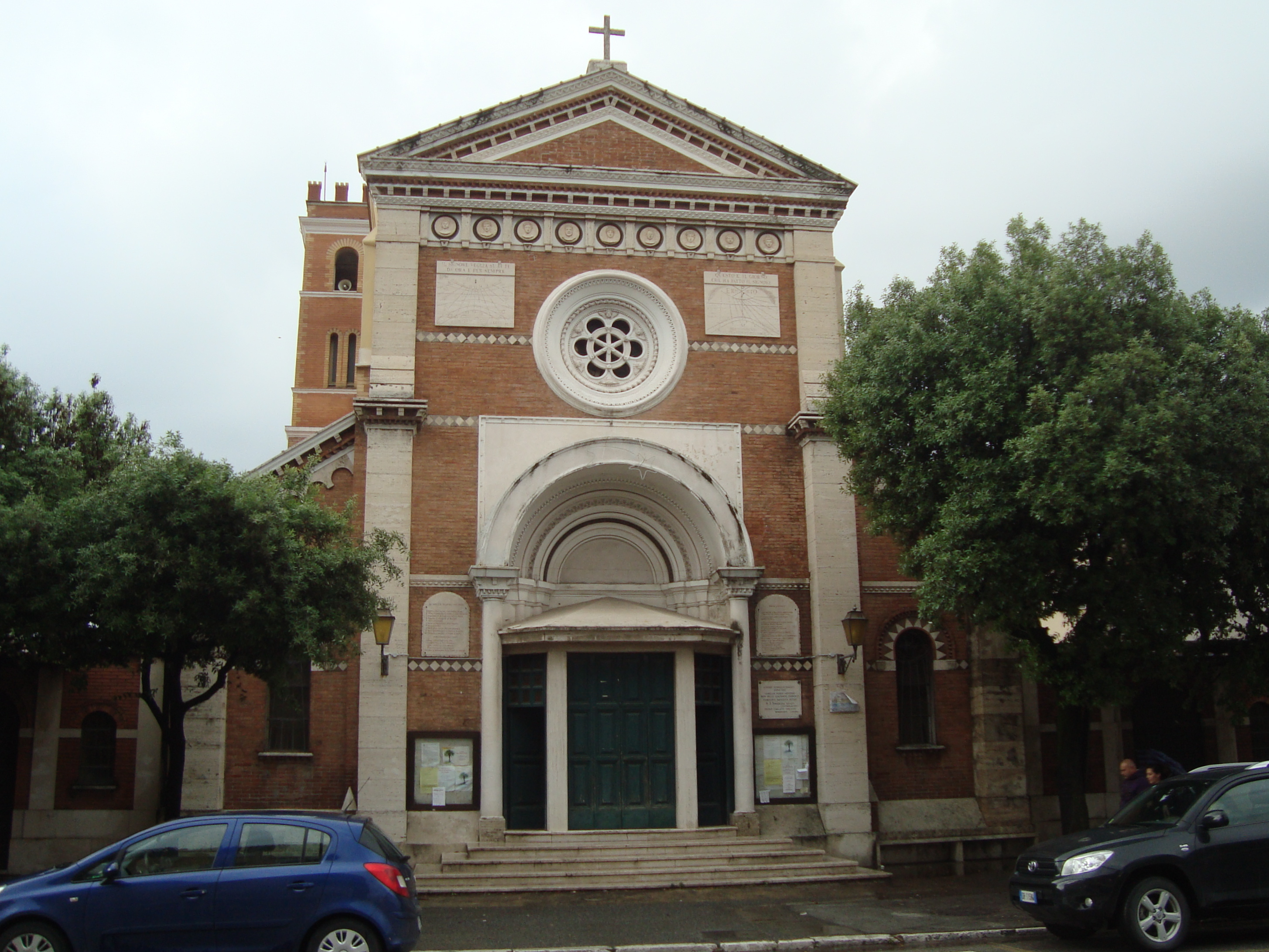 L'église San Sinforosa de Tivoli Terme sur la via Tiburtina, Tivoli, Italie